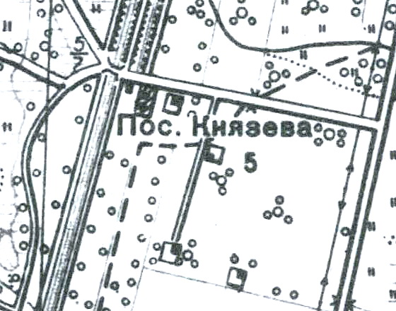 Топографическая карта Ленинградской области, квадрат О-35-12-Б-г (Петергоф), деревня Князево